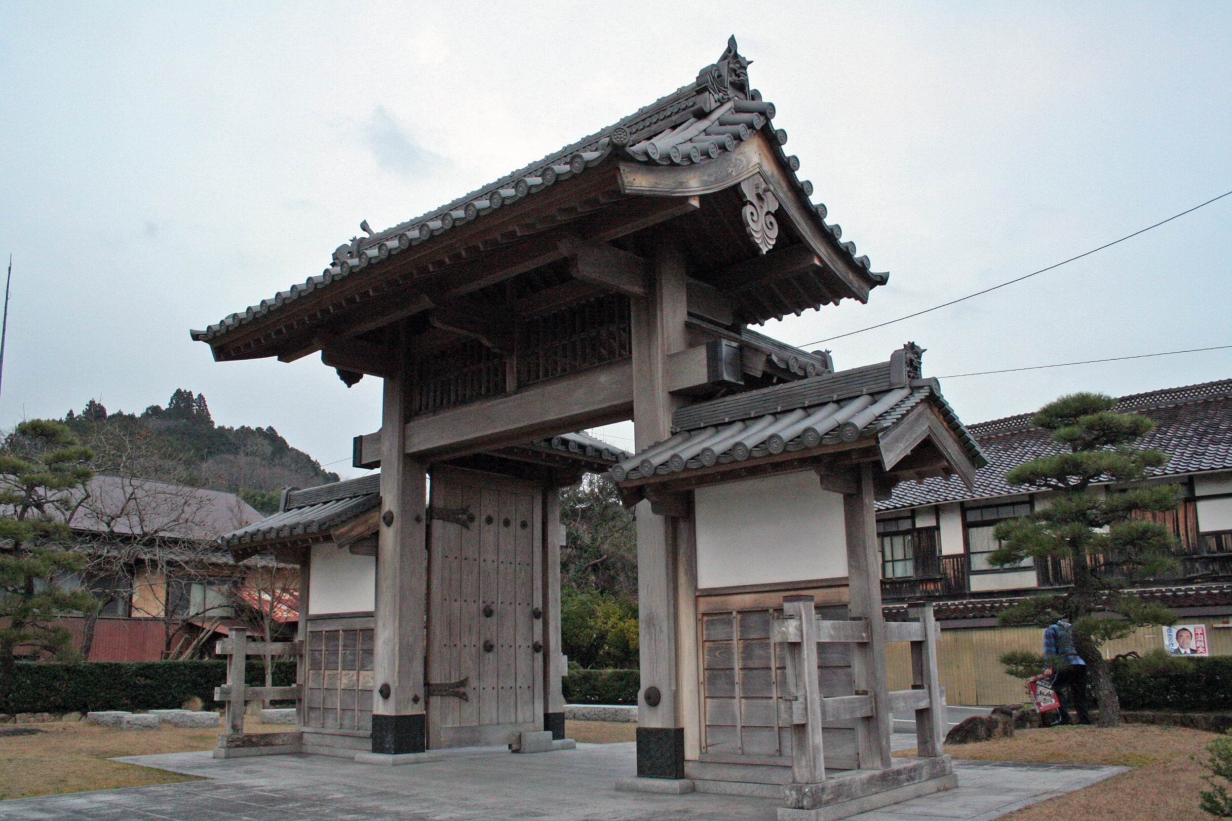 南西から見た旧土居宿の西惣門。